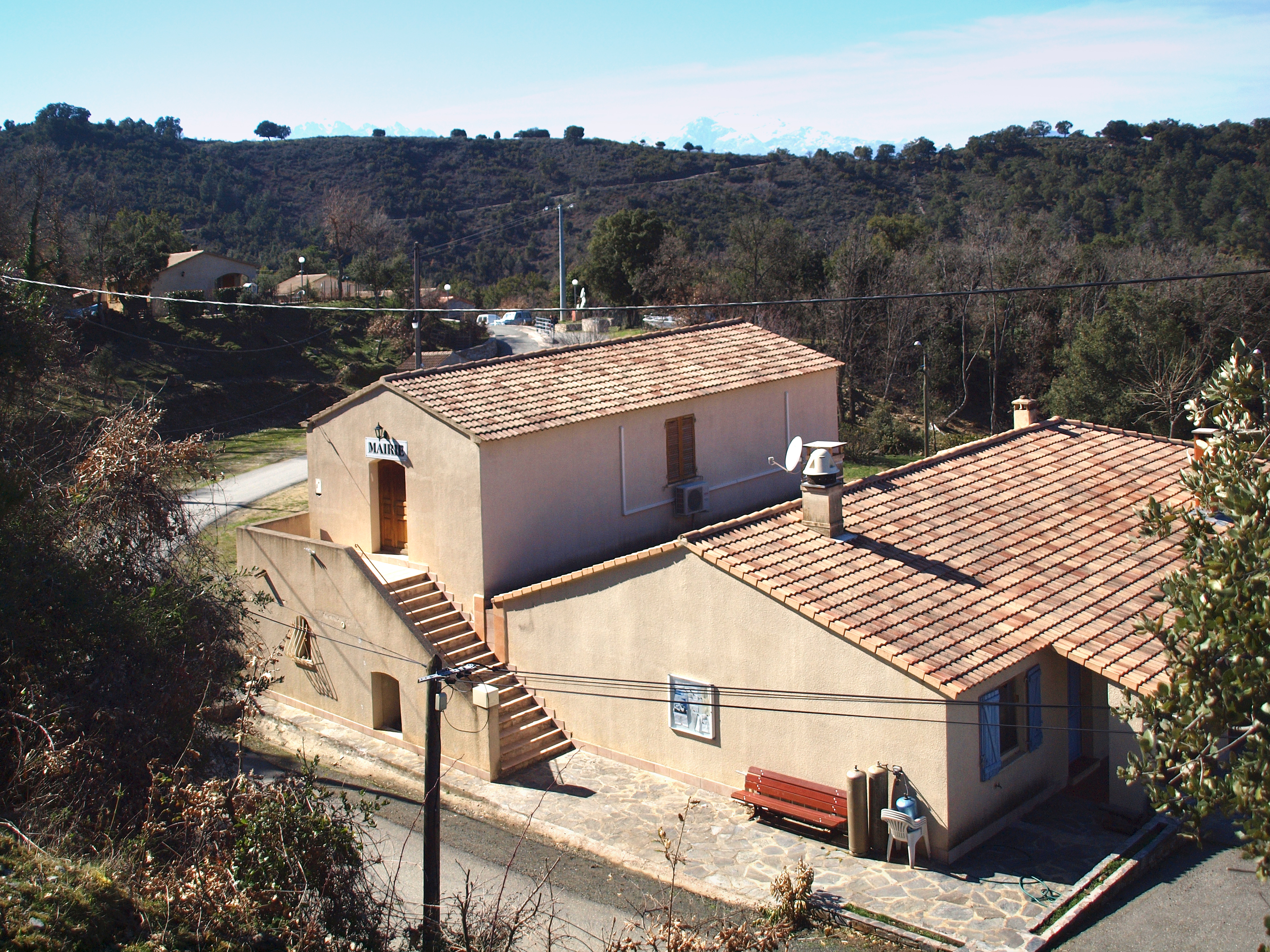 Corsu: E Valle di Rustinu, Rustinu (Corsica) - A Casa cumuna